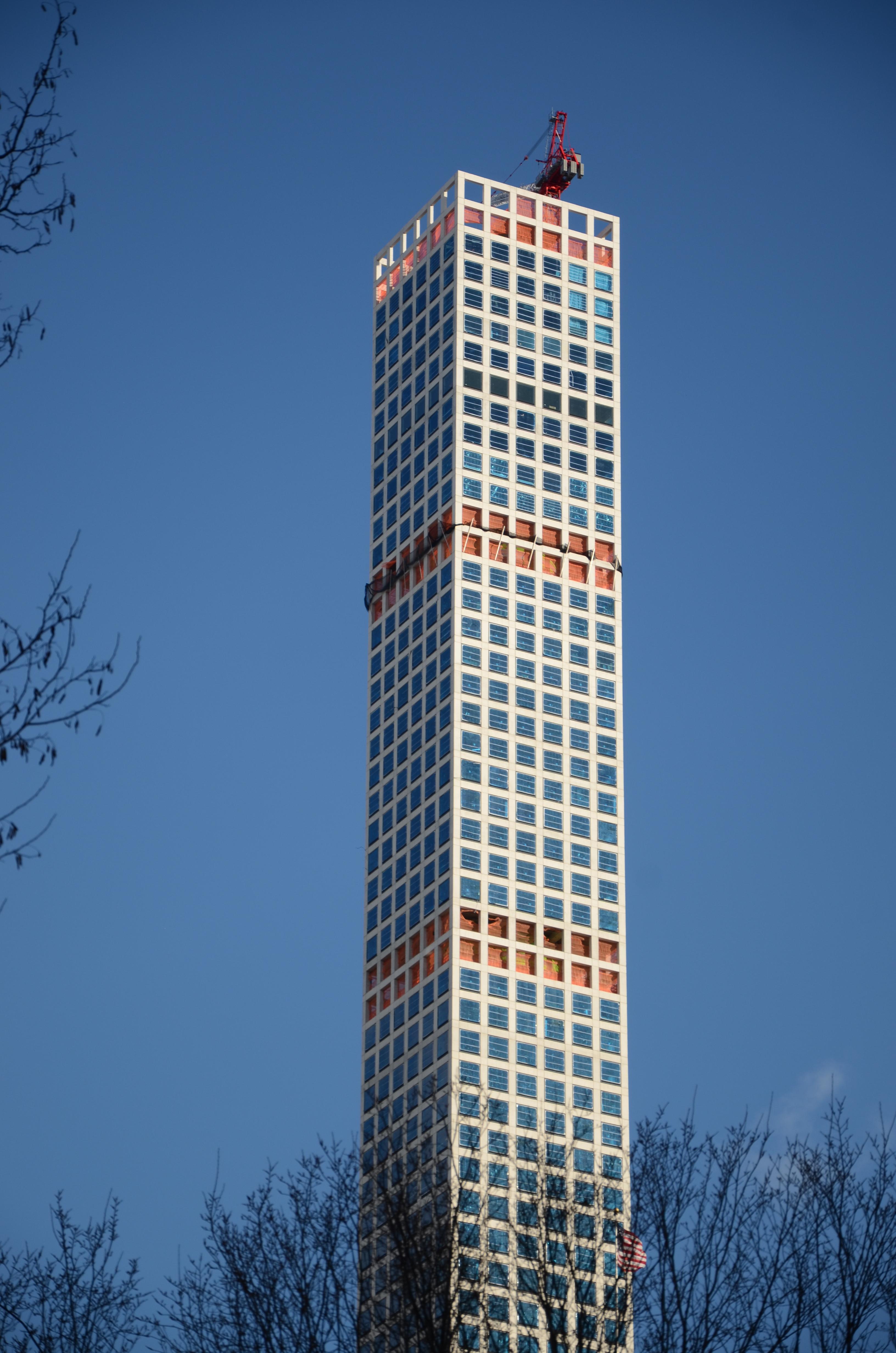 De 432 Park Avenue-woontoren in New York in aanbouw.